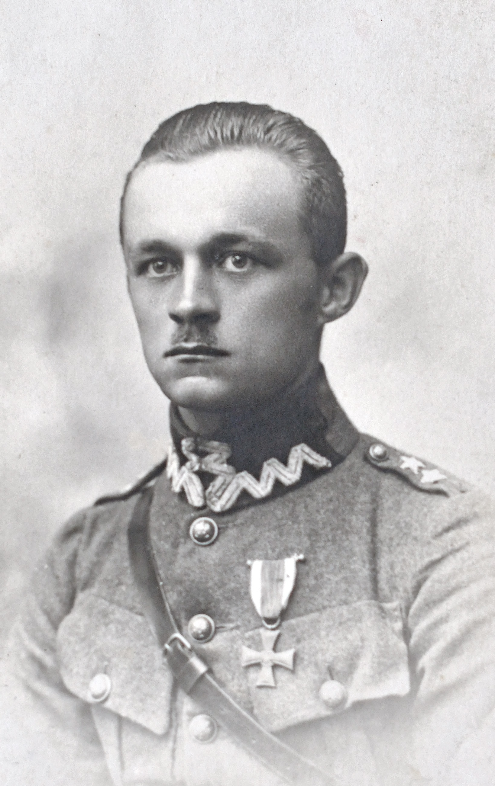 Kazimierz Szpądrowski jako młody oficer odznaczony Krzyżem Walecznych prawdopodobnie w latach 20-tych